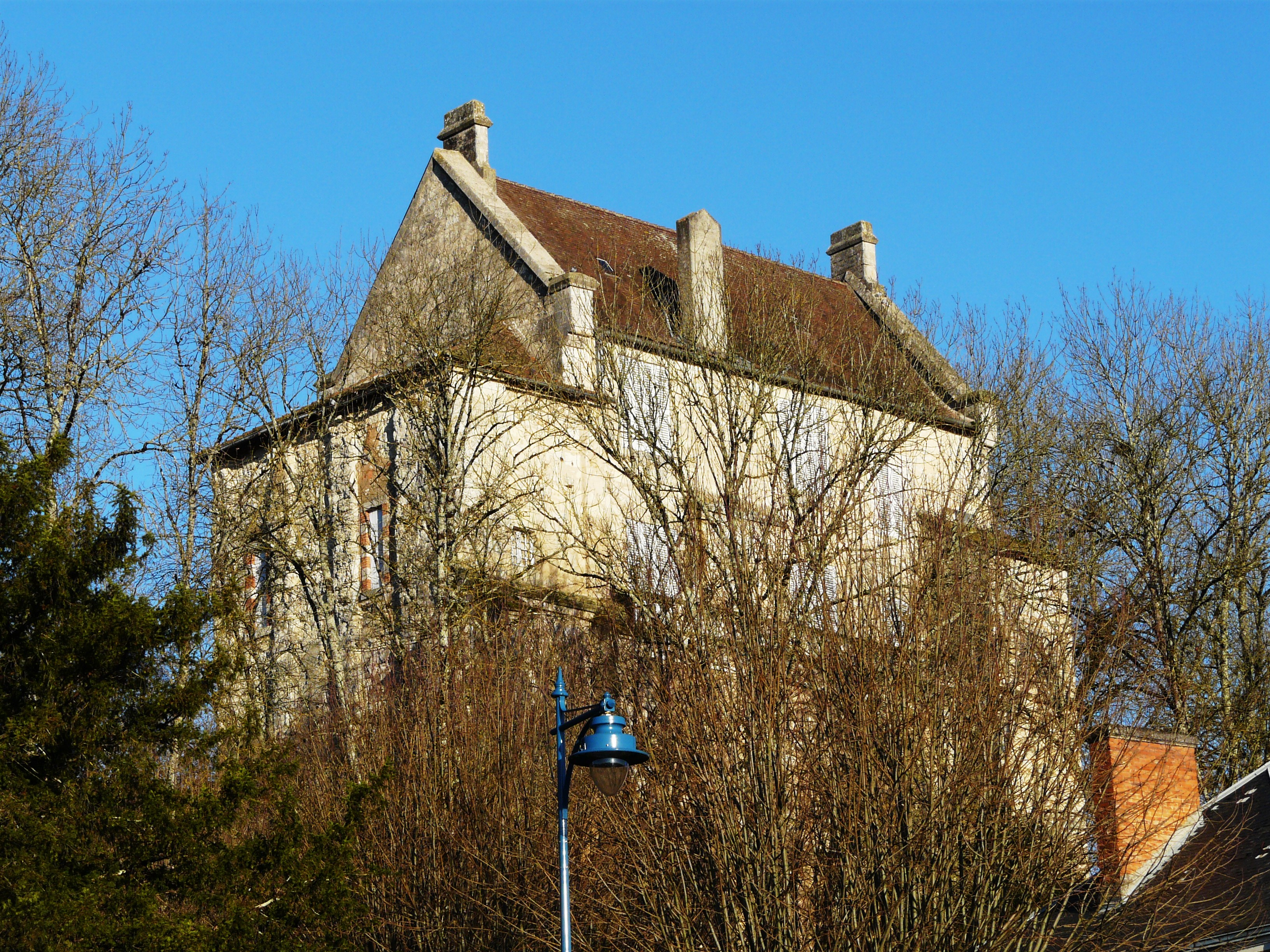 Le château d'Agonac vu depuis le sud, Dordogne, France